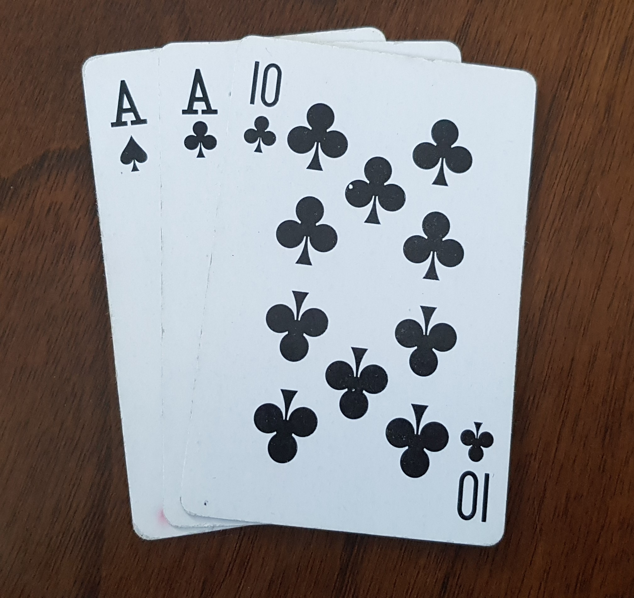 Chlust z dwóch asów i dziesiątki żołądź, która zastępuje trzeciego.